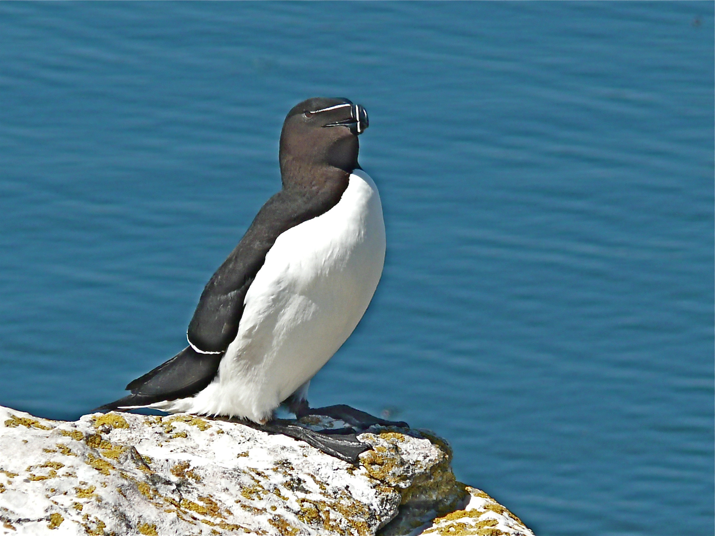 Alca torda Dag 2 Stora Karlsö